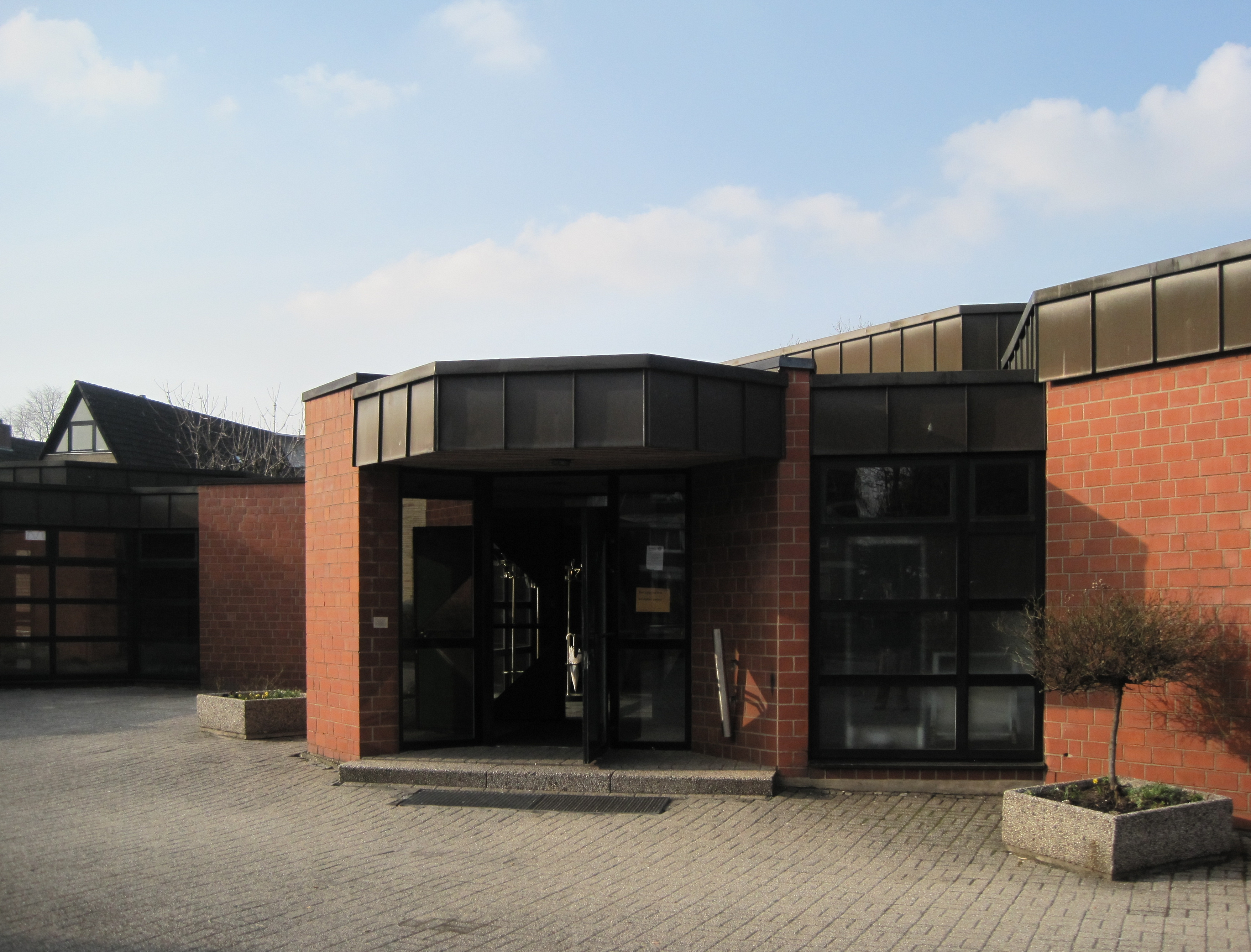 Das Foto zeigt die Christuskirche in Hamm-Bockum-Hövel.